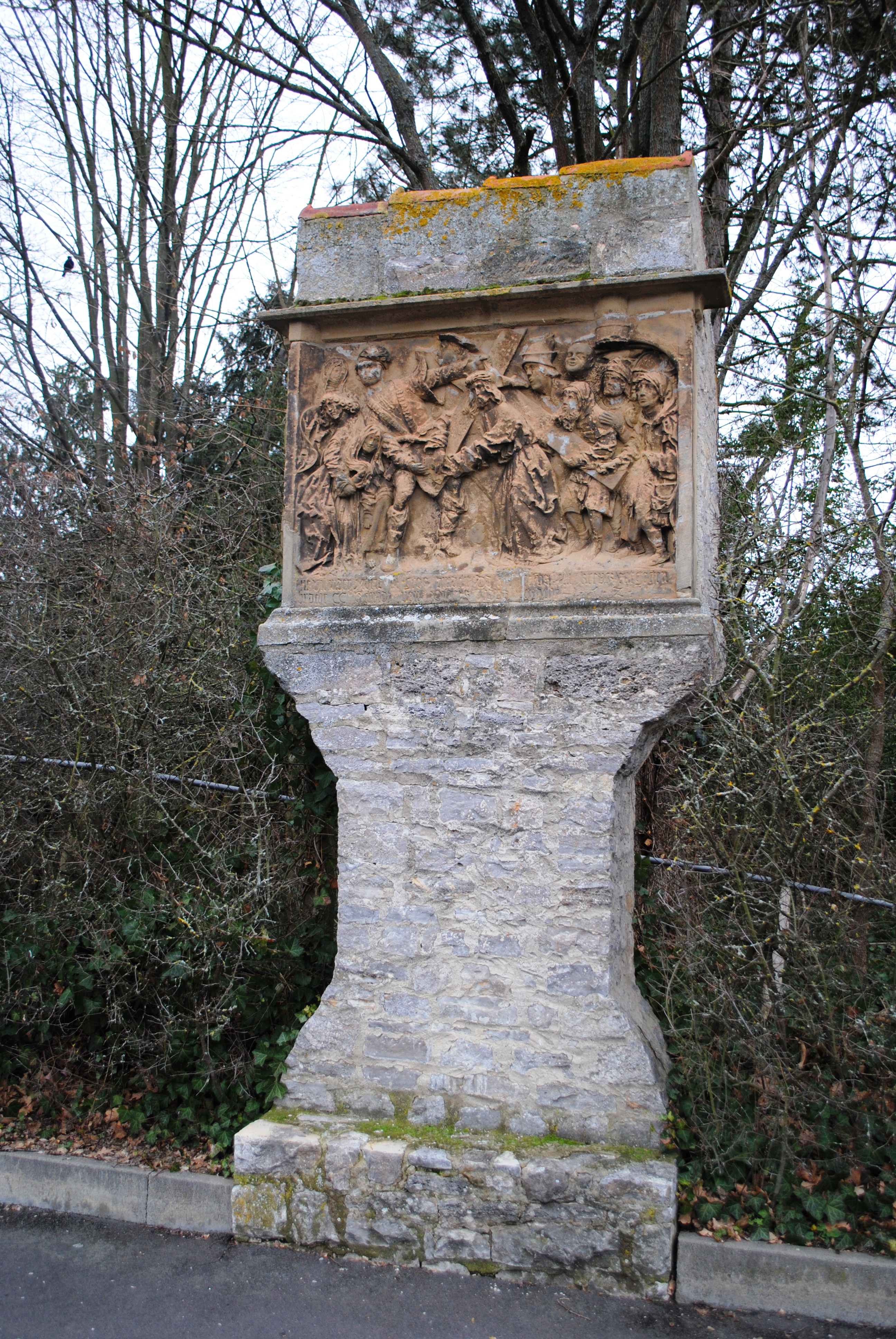 Volkach, Kreuzwegstation, Maria, drei Reliefs auf Sockelbauten, oben durch ein Pultdach abgeschlossen: 1. Christus begegnet seiner Mutter, bez. 1521; 2. Simon von Cyrene hilft Jesus das Kreuz tragen, bez. 1520; 3. Veronika reicht Christus das Schweißtuch, bez. 1521; D-6-75-174-143